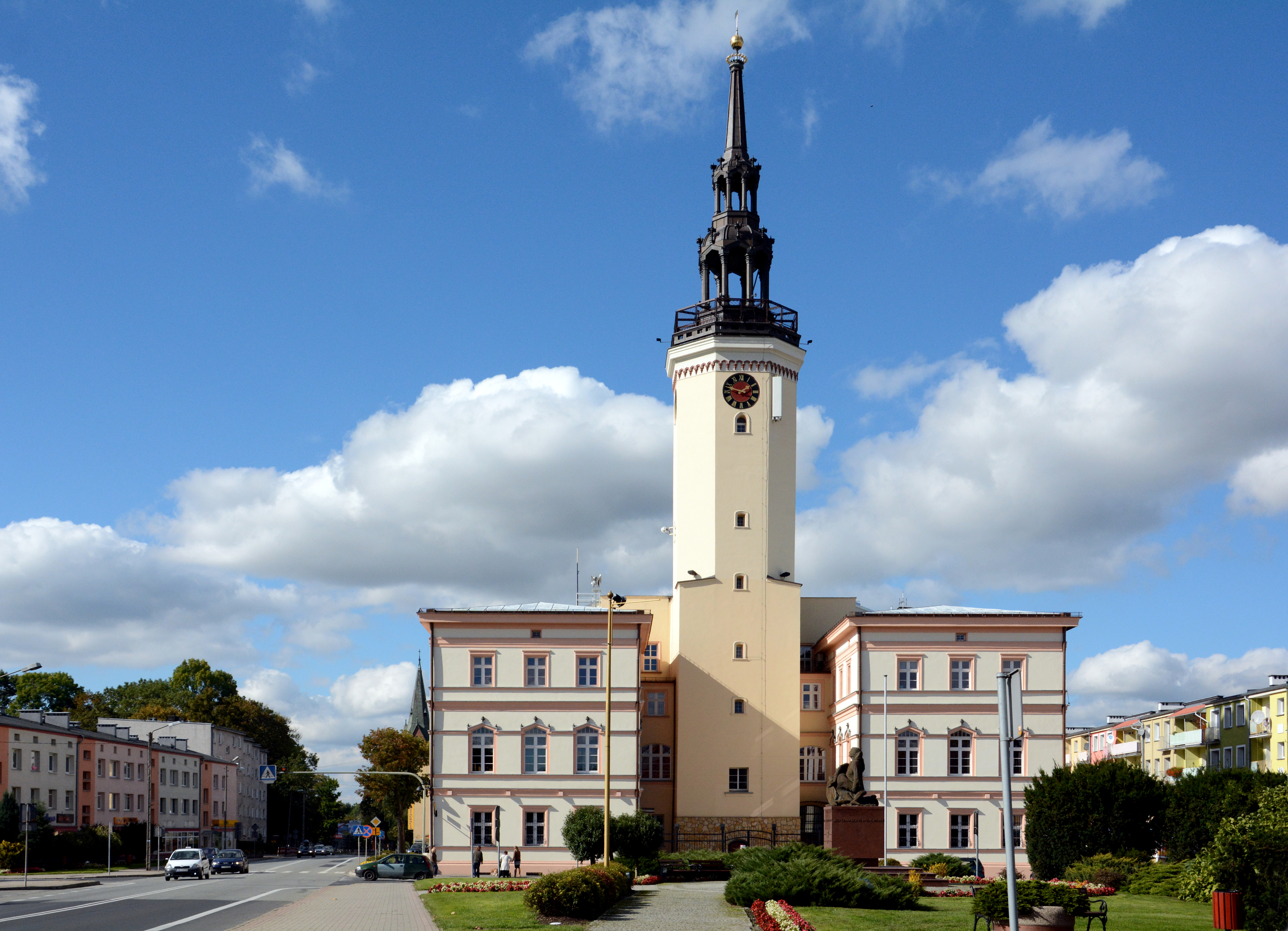 Ratusz Strzelce Opolskie